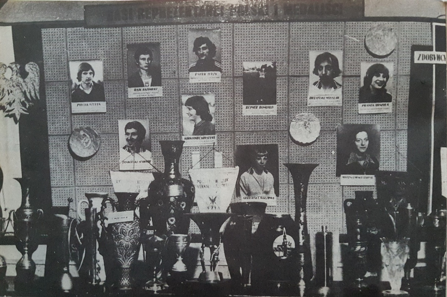 Medaliści LKS Pomorza Stargard